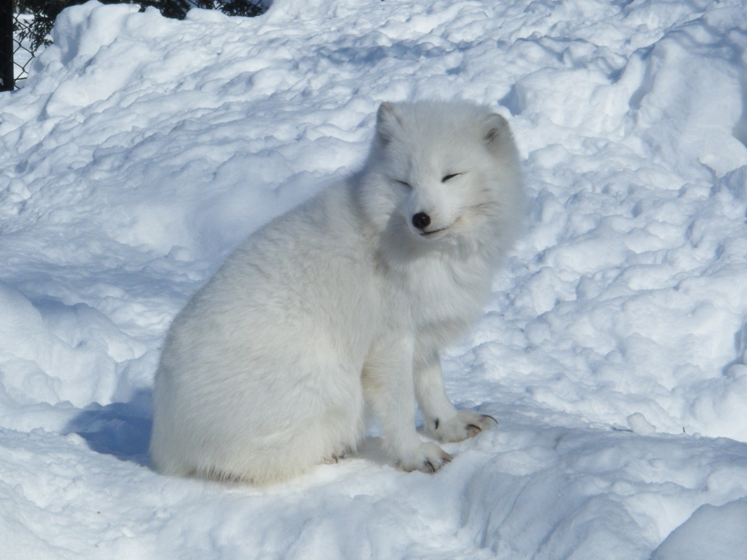 ホッキョクギツネ